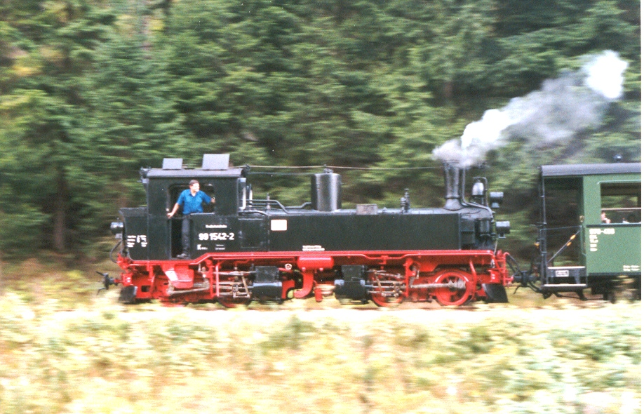 Lokomotiva IV K 99 1542 - Pressnitztalbahn.